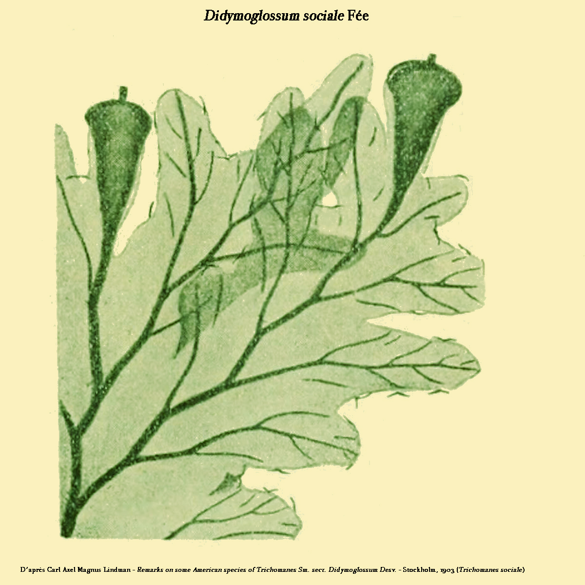 Fronde de Didymoglossum sociale - Planche de Carl Axel Magnus Lindman de Remarks on some American species of Trichomanes Sm. sect. Didymoglossum Desv. reprise par D.Prévôt